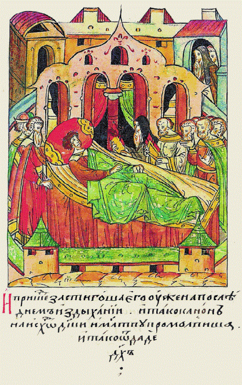 И придя, заста- ли князя уже на последнем издыхании, и когда канон на исход души и молитву прочли, то он испустил дух.